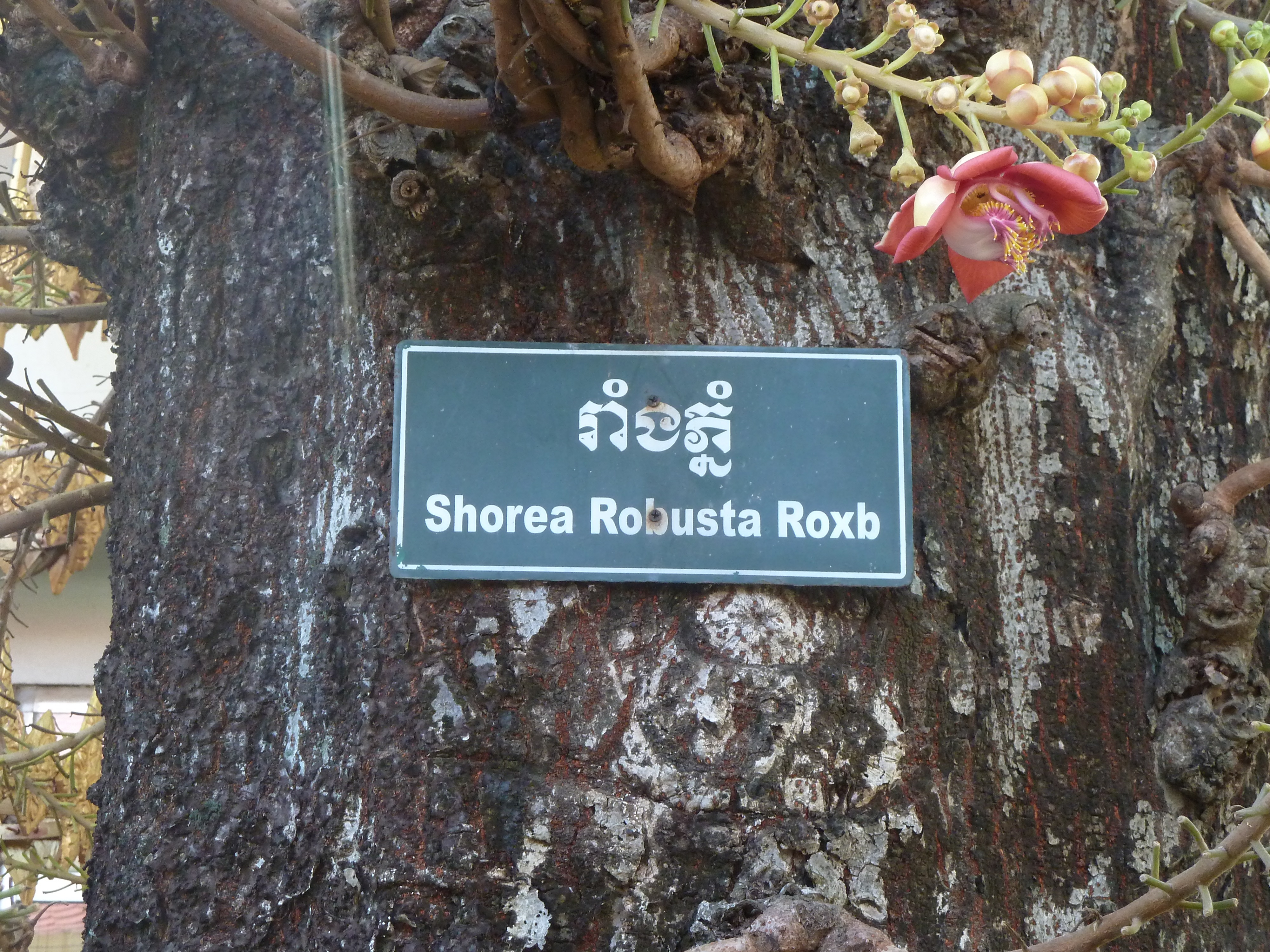 Fausse détermination de Couroupita guianensis (Shorea robusta), près du Palais royal, Phnom Penh